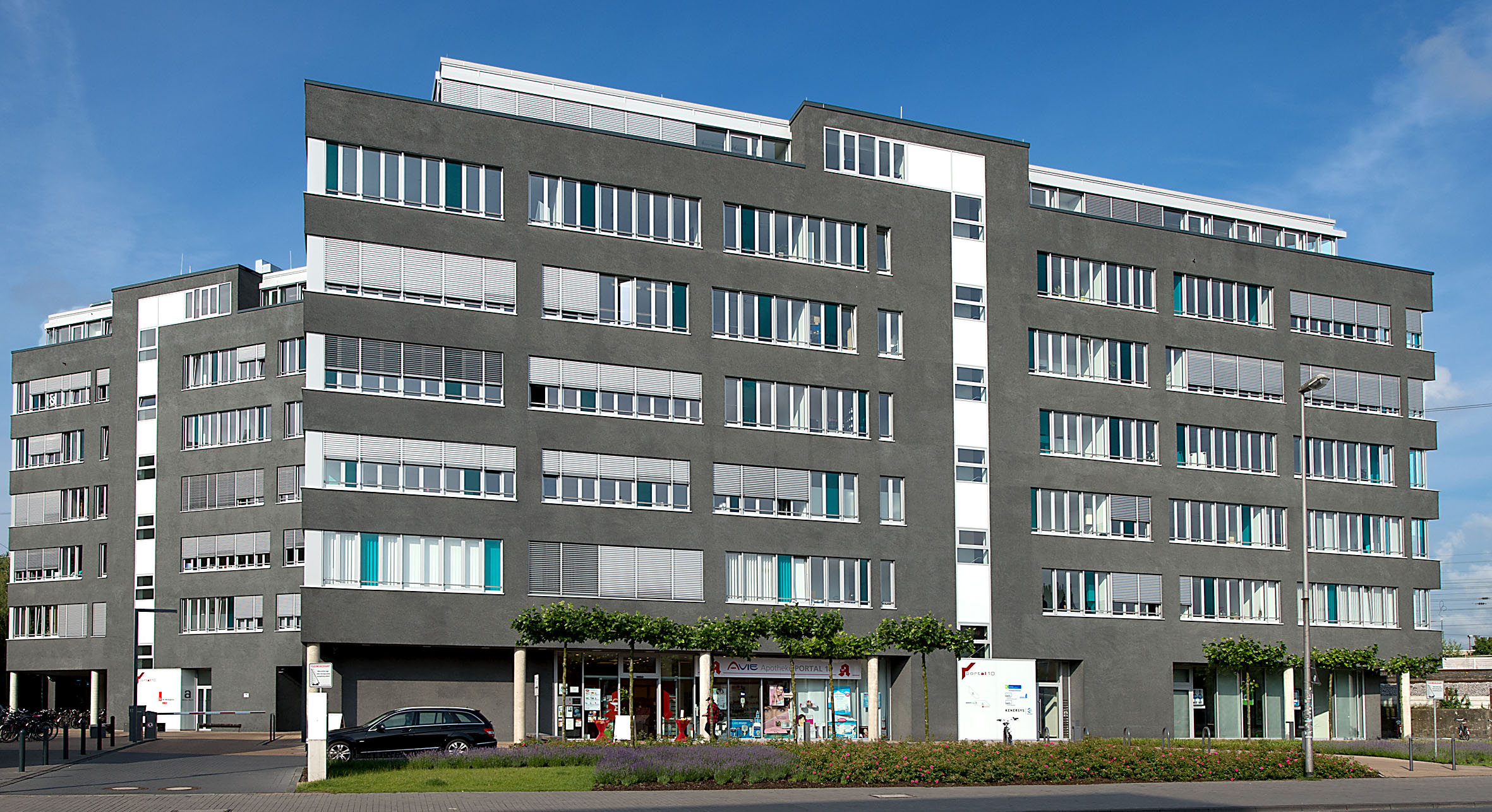 Der Interessenverband Deutscher Zeitarbeitsunternehmen (iGZ) hat seine Bundesgeschäftsstelle im PortAL 10, Münster.